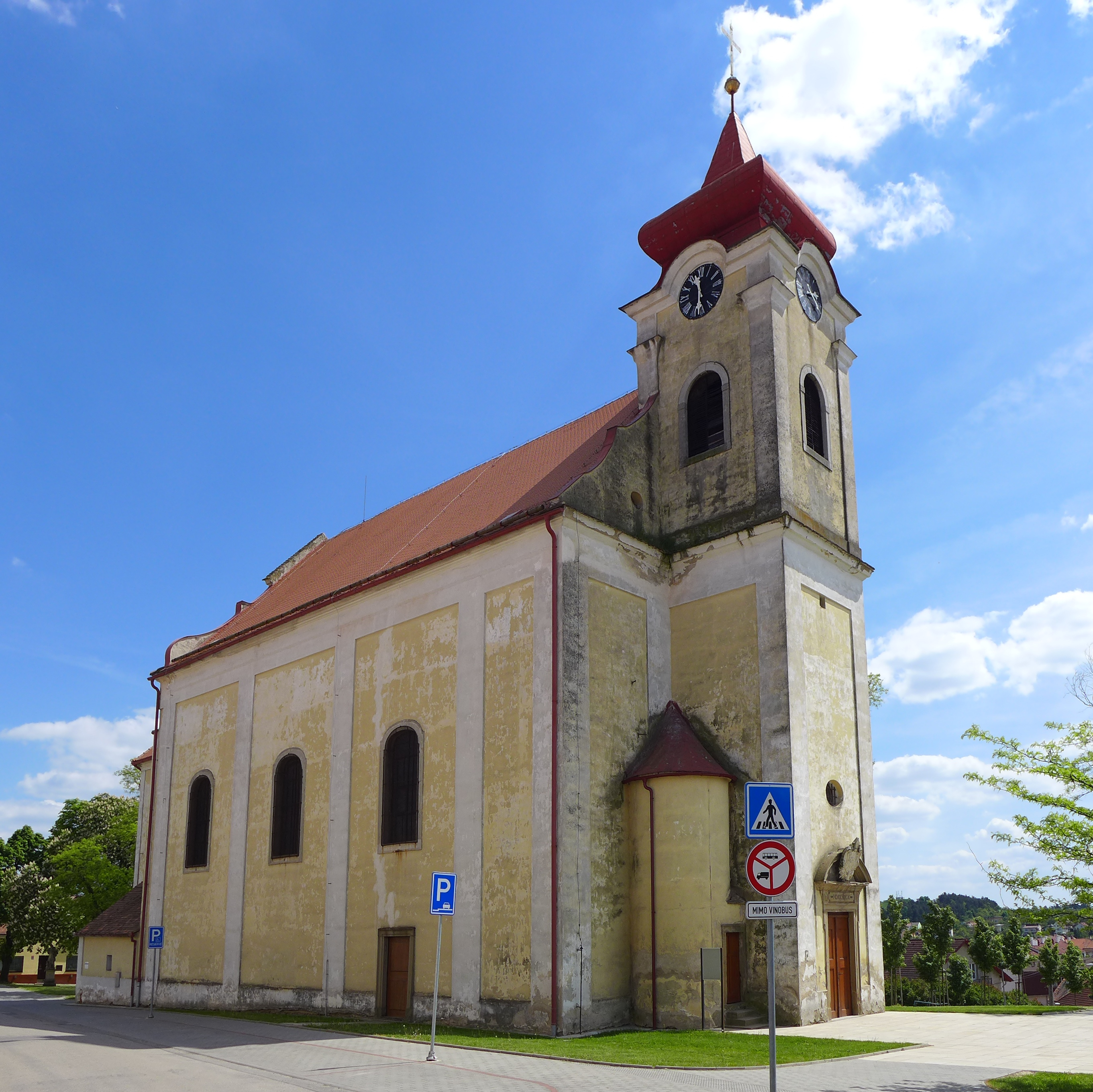 Kostel svatých Petra a Pavla, Miroslav, Miroslav (okres Znojmo).